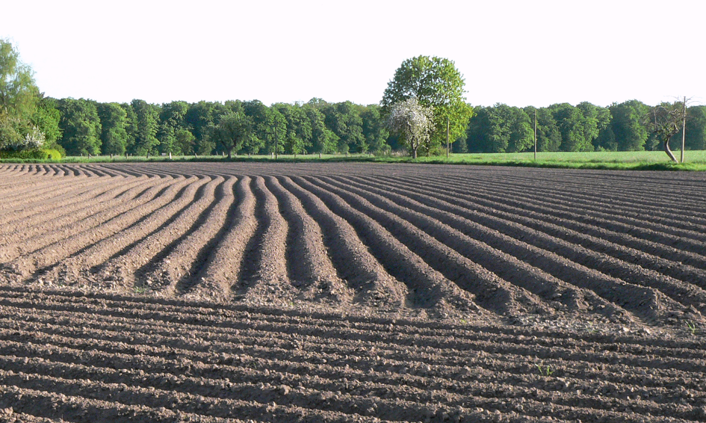 Kartoffelacker bei Kirchwehren, Niedersachsen